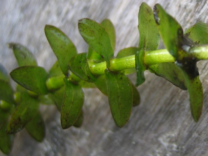 Kanadische Wasserpest Elodea canadensis